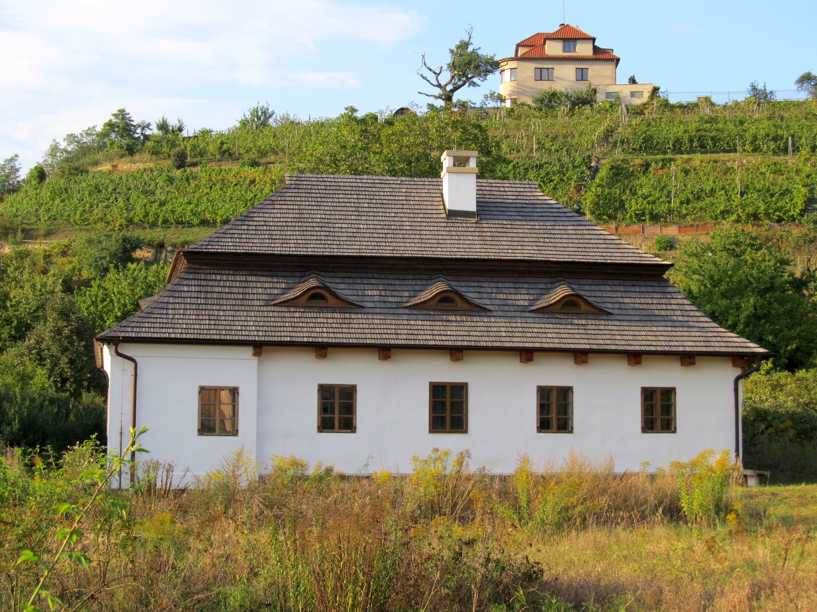 Venkovská usedlost (Modřany), Praha 12, Chuchelská 6, Modřany